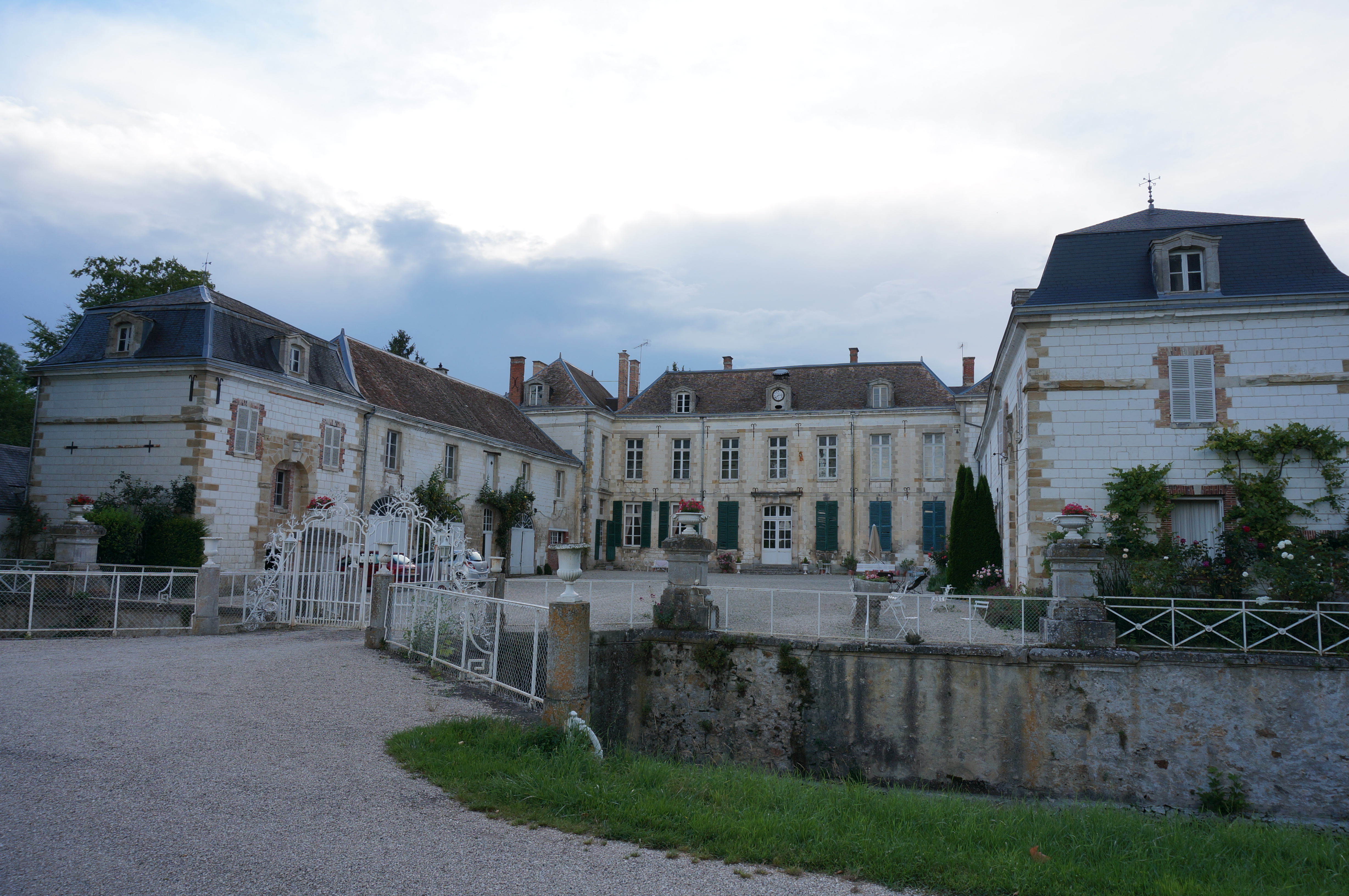 à Juvigny_le château.